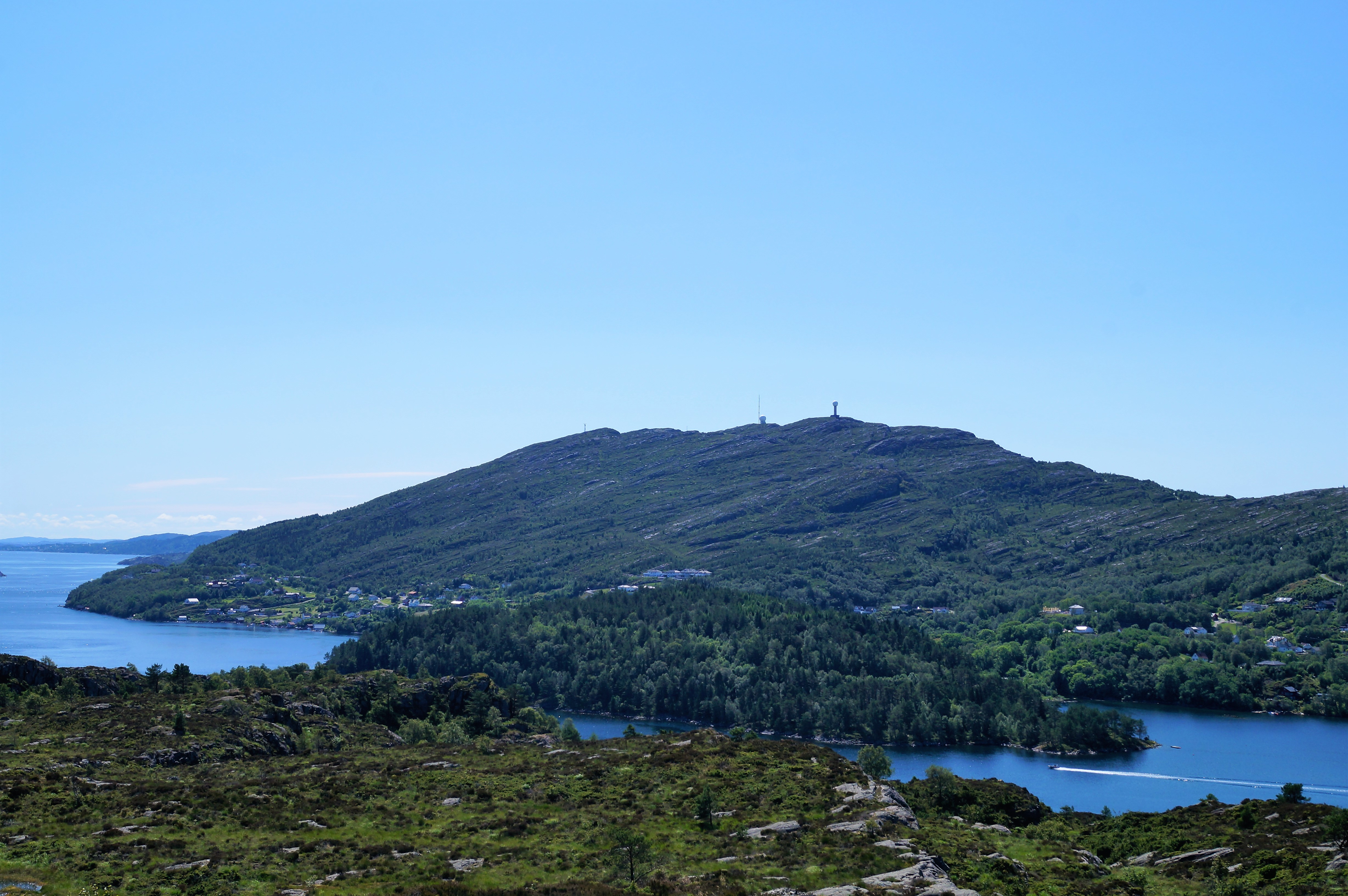 Liatårnet sett fra Straume